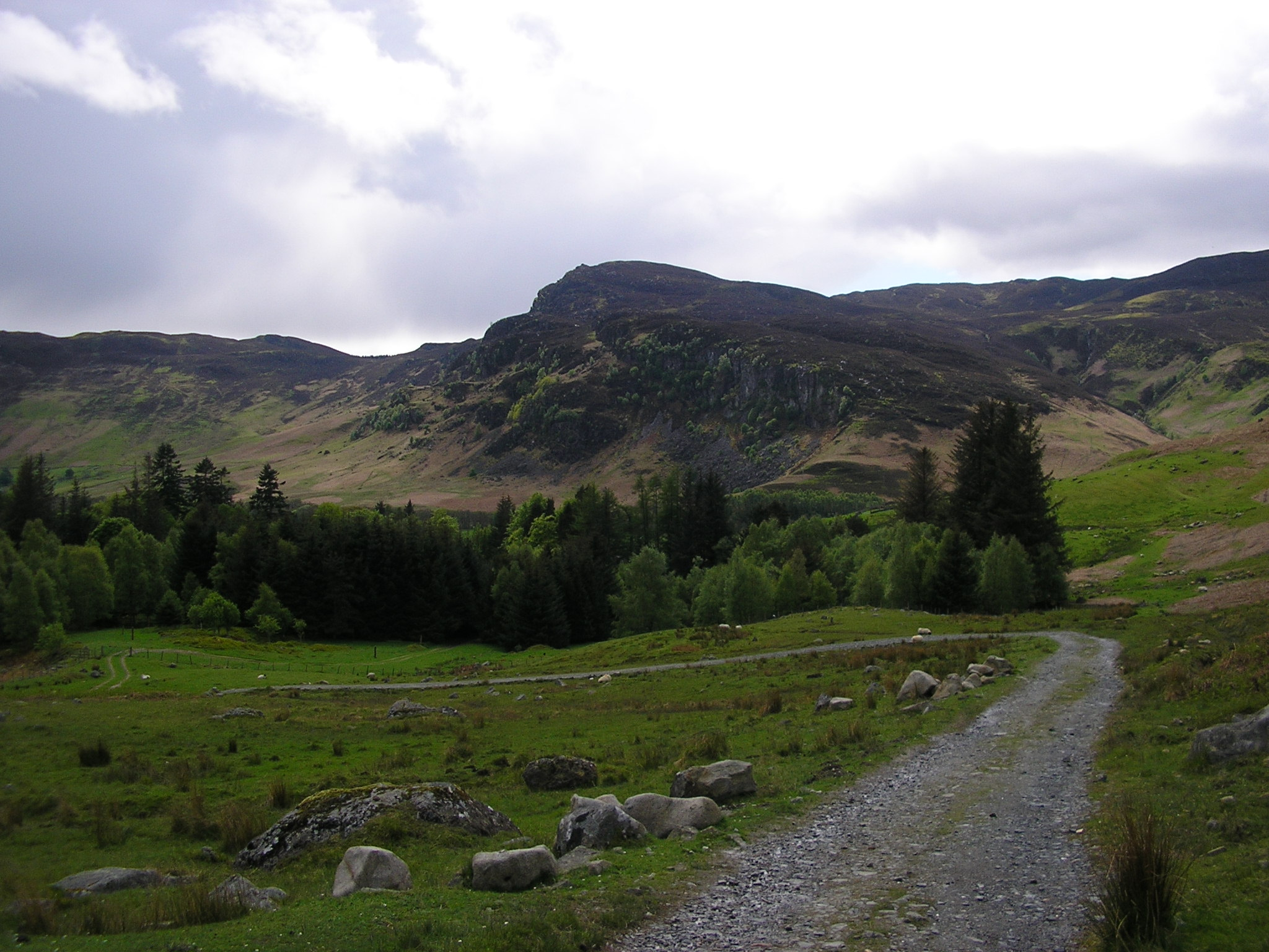 Looking towards Ben Chonzie